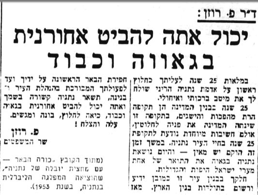 19.2.65 ד"ר פנחס רוזן מביע הערכה לבנייה בארץ של חברת משה שקד